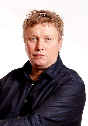 Tomáš Motl